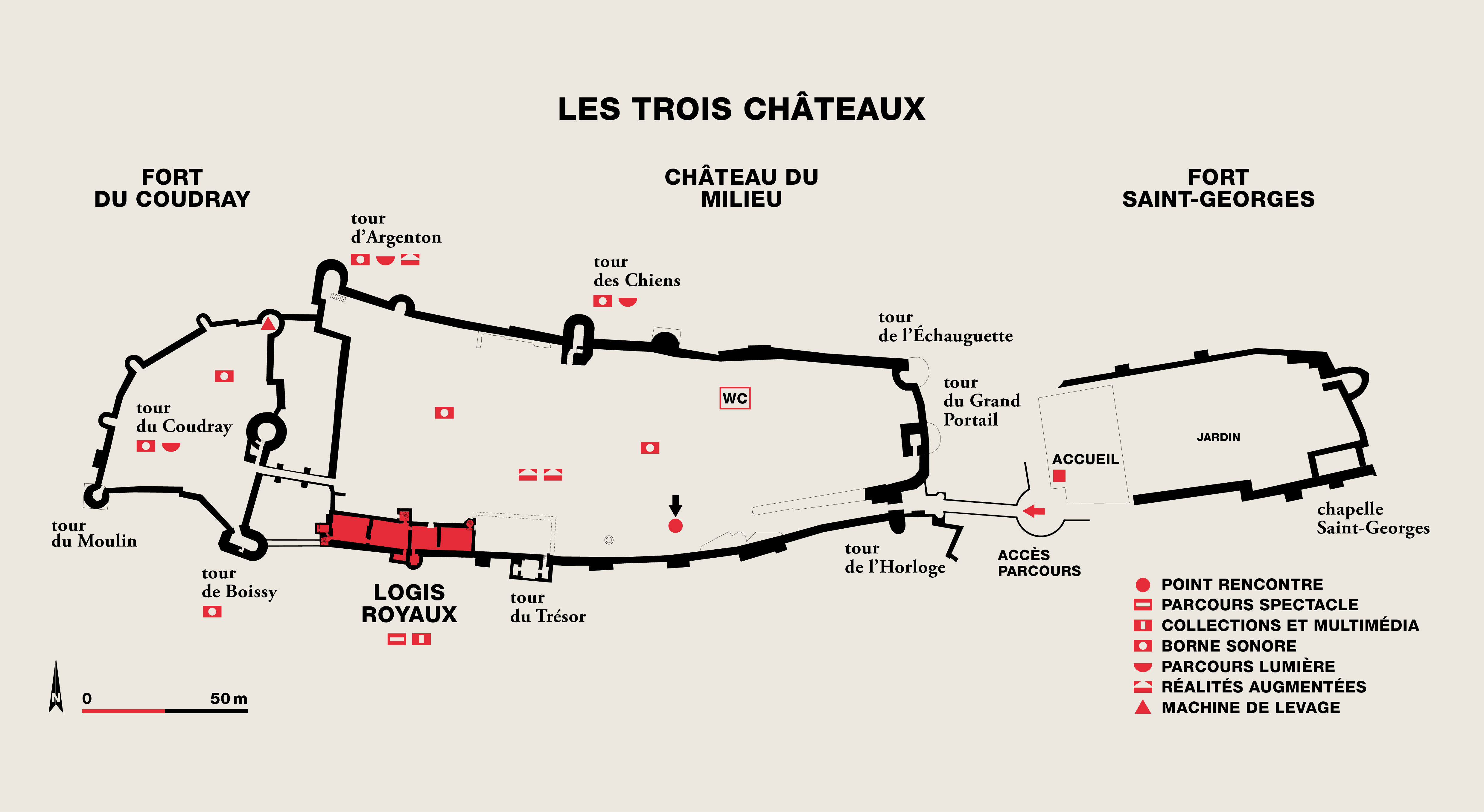 Plan de la forteresse royale de Chinon réalisé par Agnès Dahan